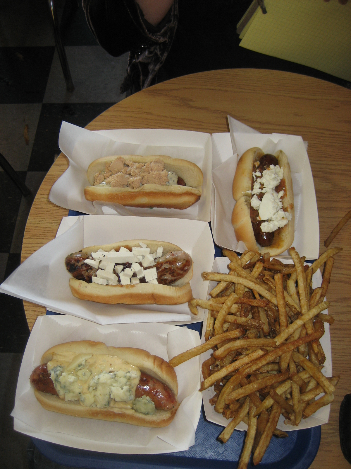 Alligator, Snake, Foie Gras, Lamb Sausages and Duck Fat Fries